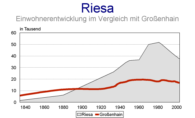 Einwohnerentwicklung von Riesa im Vergleich mit Großenhain, selbst erstellt. Datenreihe Riesa: 1834 - 1.631 1875 - 5.707 1880 - 6.259 1933 - 26.248 1939 - 29.963 1946 - 34.406 1950 - 36.150 1960 - 36.769 1970 - 49.960 - Volkszählungsergebnis 1. Januar 1971 1981 - 51.857 1984 - 50.107 1995 - 42.429 1997 - 41.232 1998 - 40.491 1999 - 39.909 2000 - 39.367 2001 - 38.567 2002 - 37.970 2003 - 37.566 Datenreihe Großenhain: 1834 - 5.755 1875 - 10.686 1880 - 11.045 1933 - 13.510 1939 - 16.488 1946 - 17.708 1950 - 18.847 1960 - 19.514 1970 - 19.356 - Volkszählungsergebnis 1. Januar 1971 1981 - 18.079 1984 - 19.117 1995 - 18.037 1998 - 18.055 1999 - 17.703 2000 - 17.475 2001 - 17.222 2002 - 17.011 2003 - 16.793